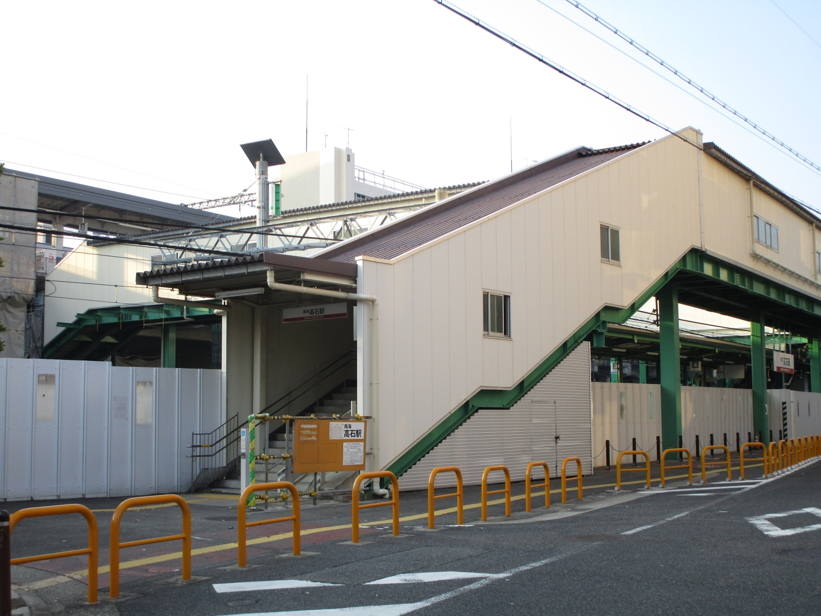 高架工事中の高石駅西口（2017年11月時点）